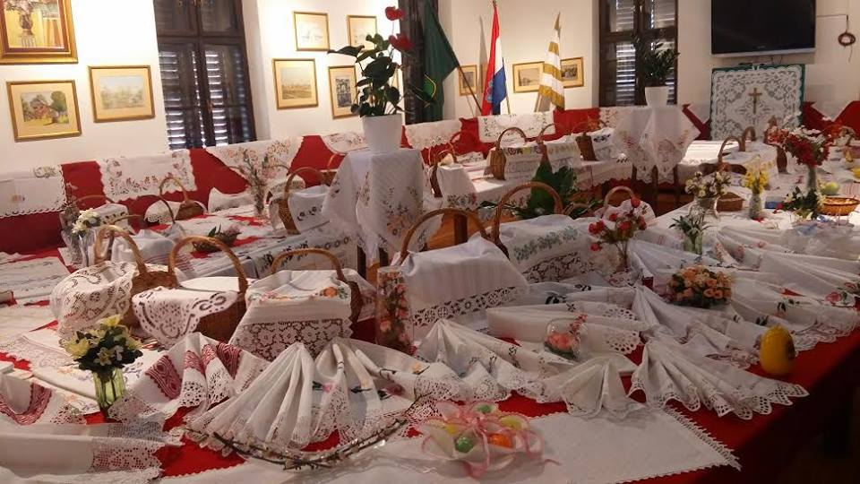 Otarčići za svetenje